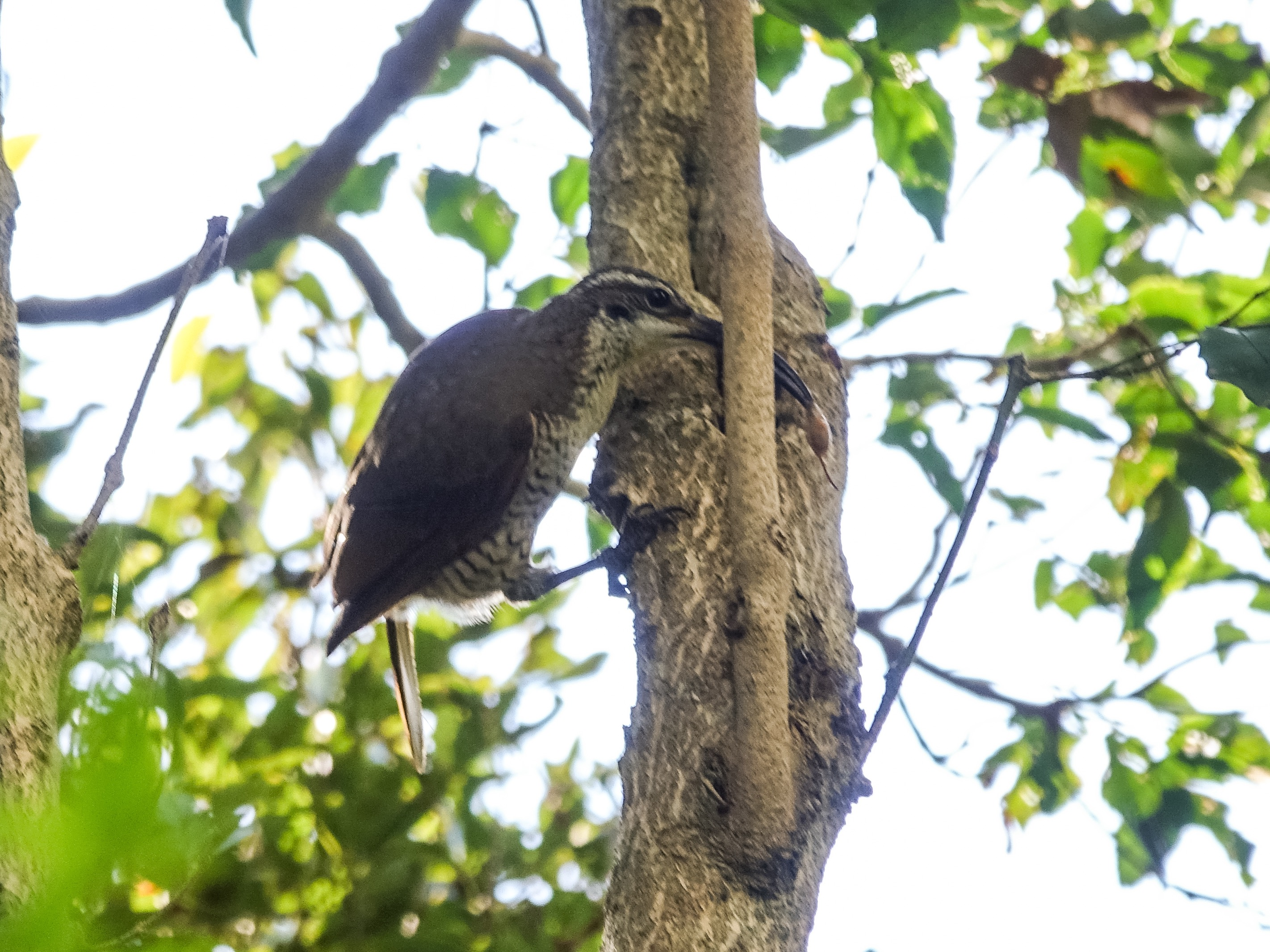 Paradise Riflebird